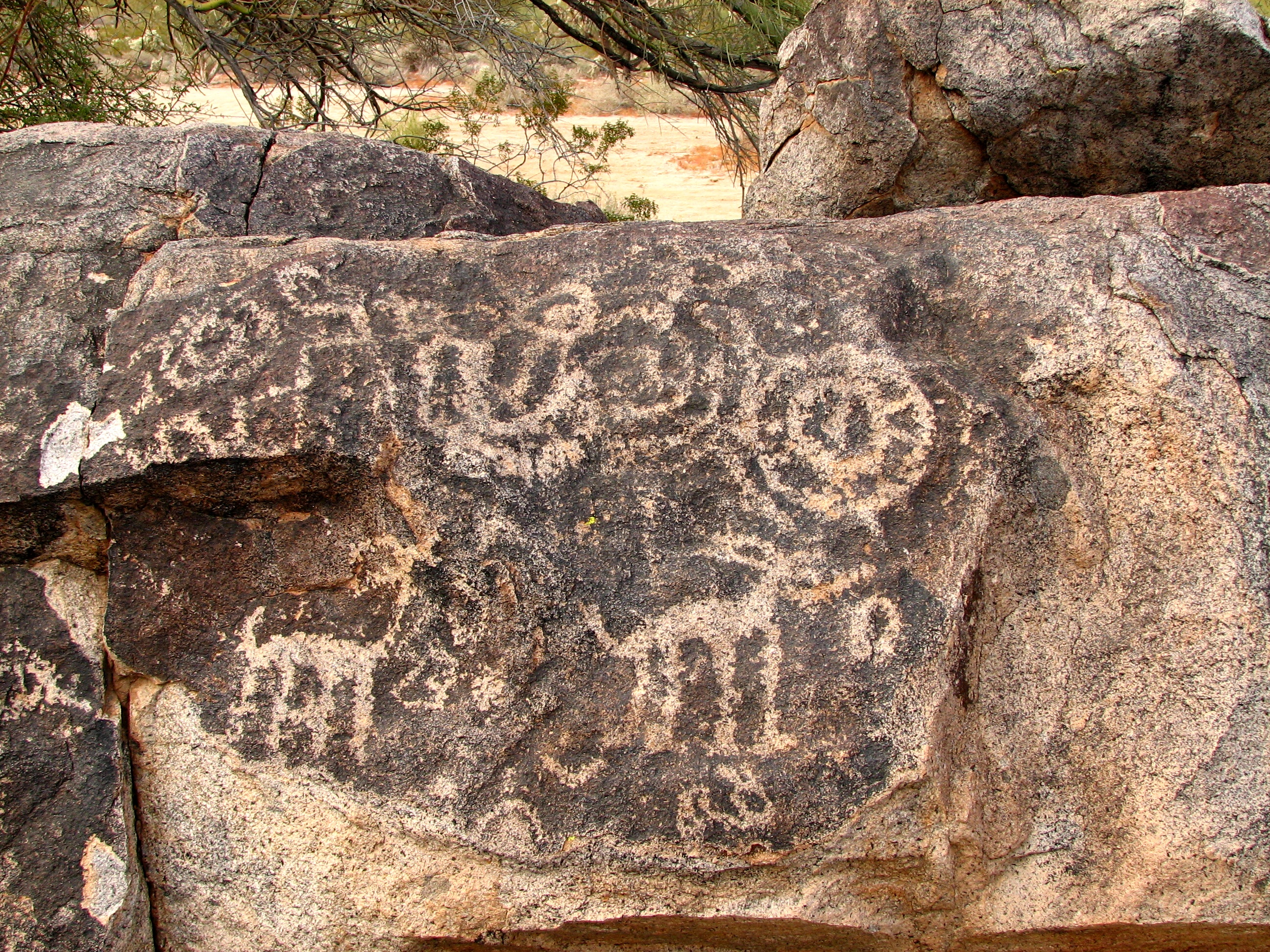 Petroglyphs, in Arizona.